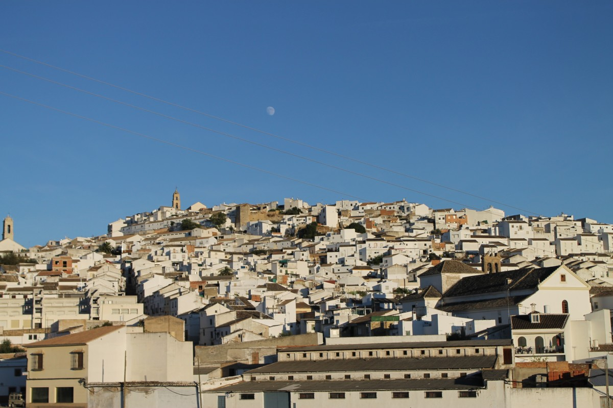 Baena